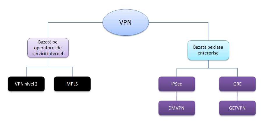 Reprezentare grafică a arhitecturii VPN